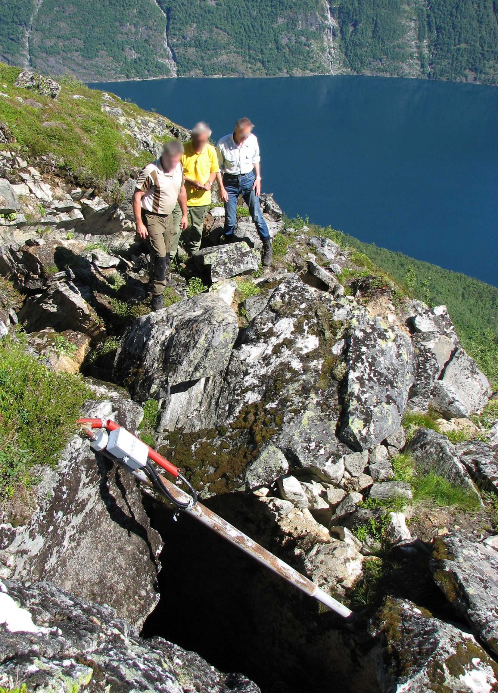 Remna på Åkerneset blir målt med strekkstag. Foto 2008.